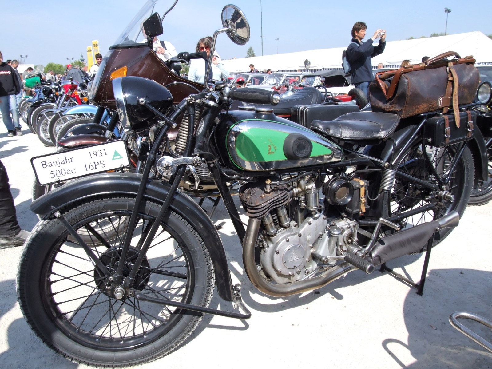 Quelle: selbst fotografiert, 04/2007 Fotograf: Späth Chr.